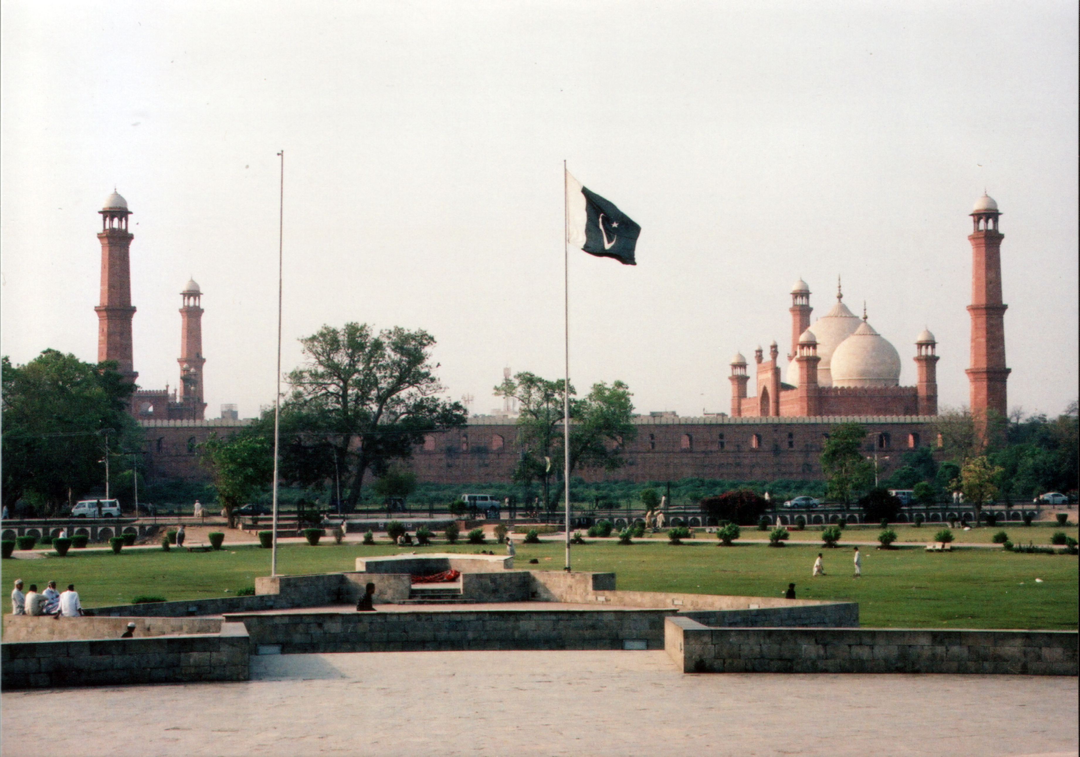 Author: Amjad Mushtaq. Date: April 2006